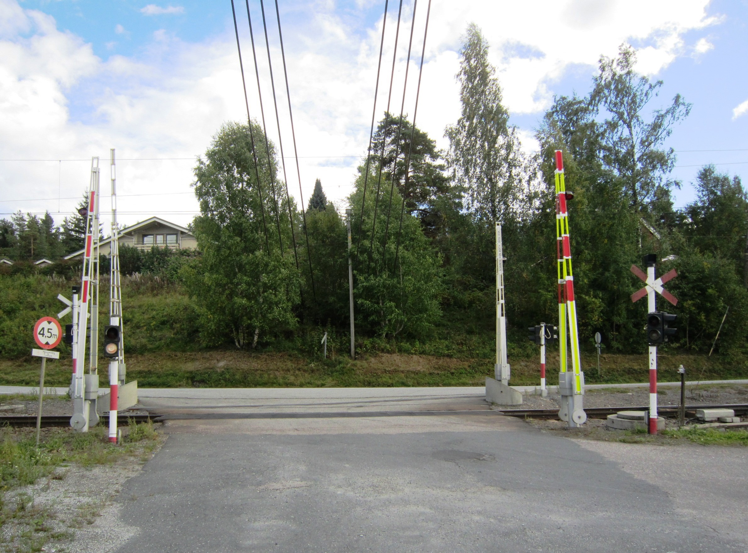 Fylkesvei 253 passerer bak denne planovergangen på Kongsvingerbanen ved Rånåsfoss.